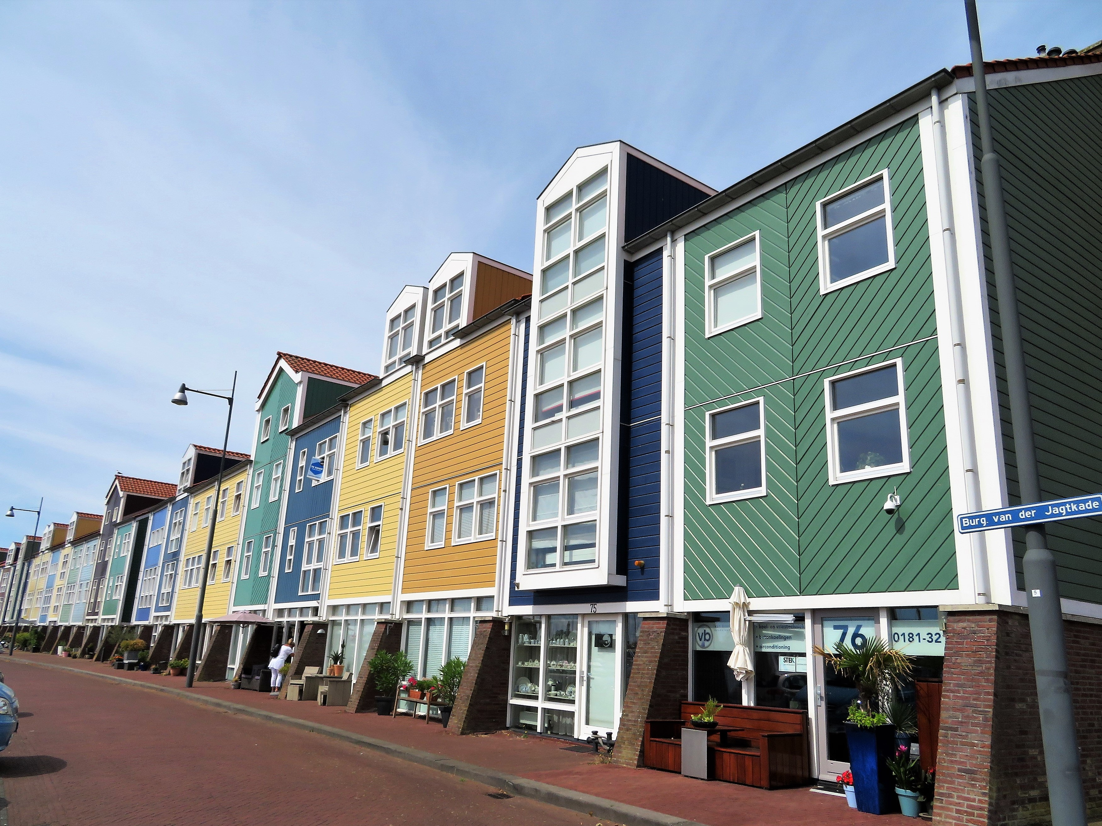 Burg. v.d. Jagtkade, Hellevoetsluis. Woningbouw Groote Dok West. Architect Gunnar Daan. 2002-2005